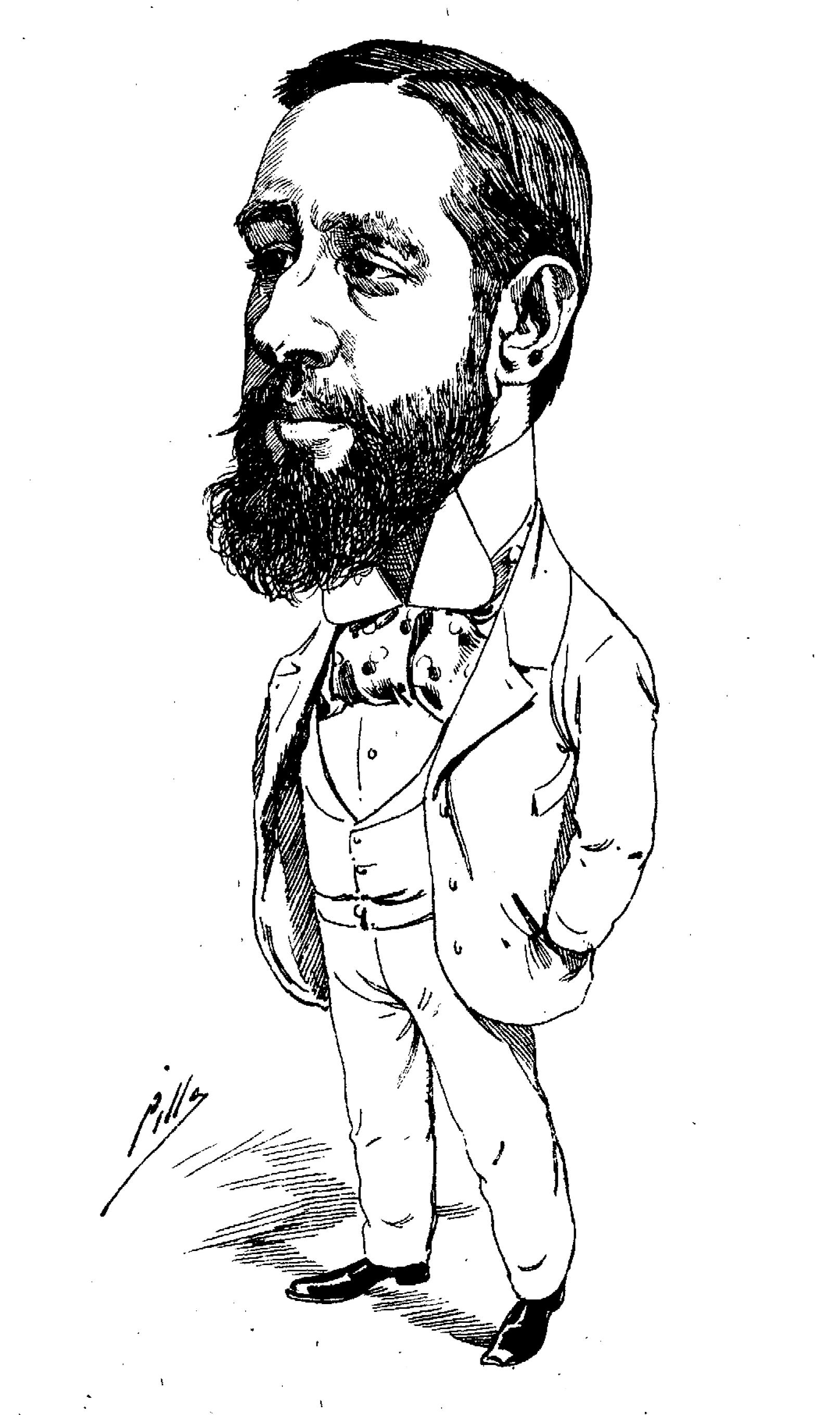 Carlos Ossorio y Gallardo.